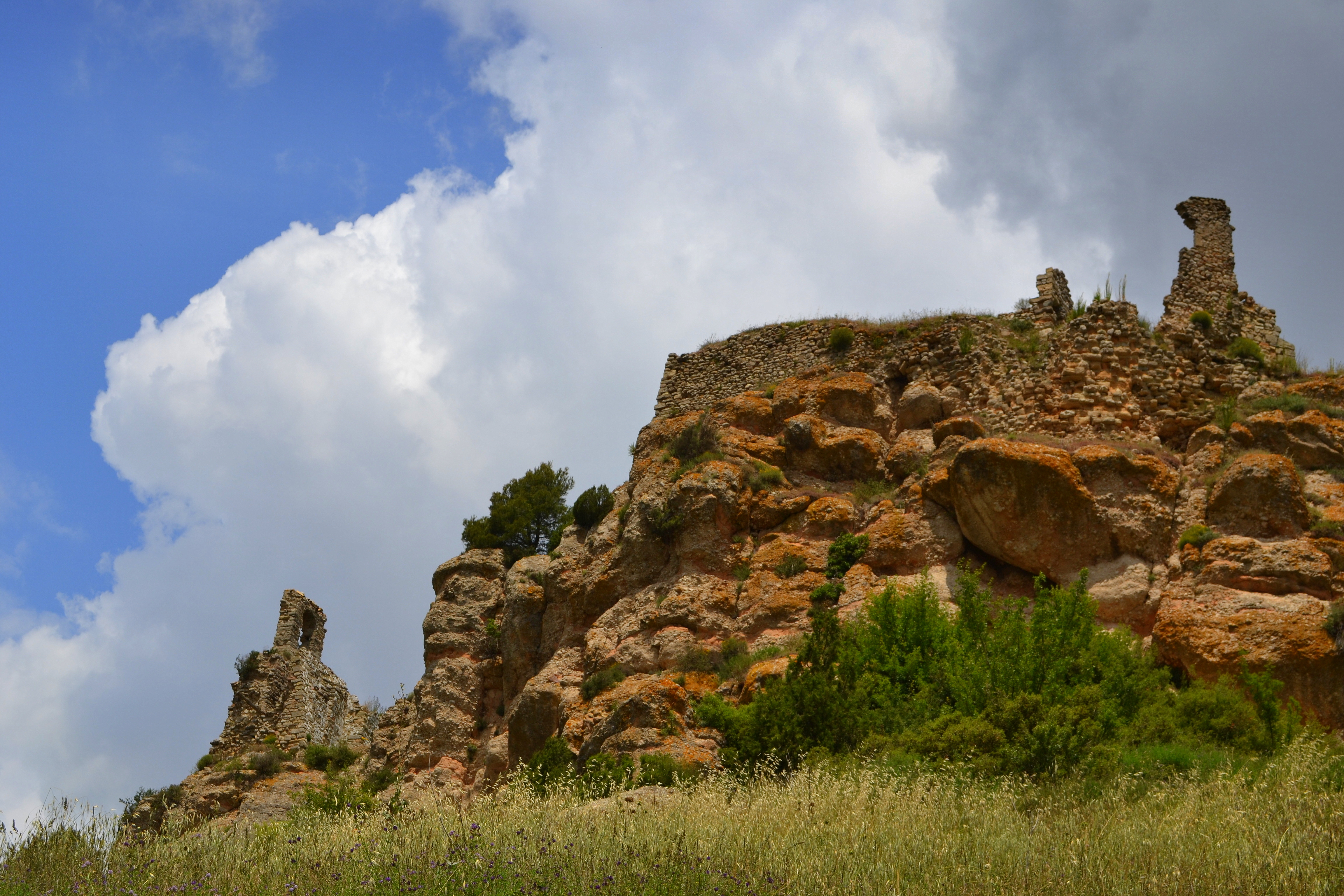 Castell de Queralt (Bellprat)